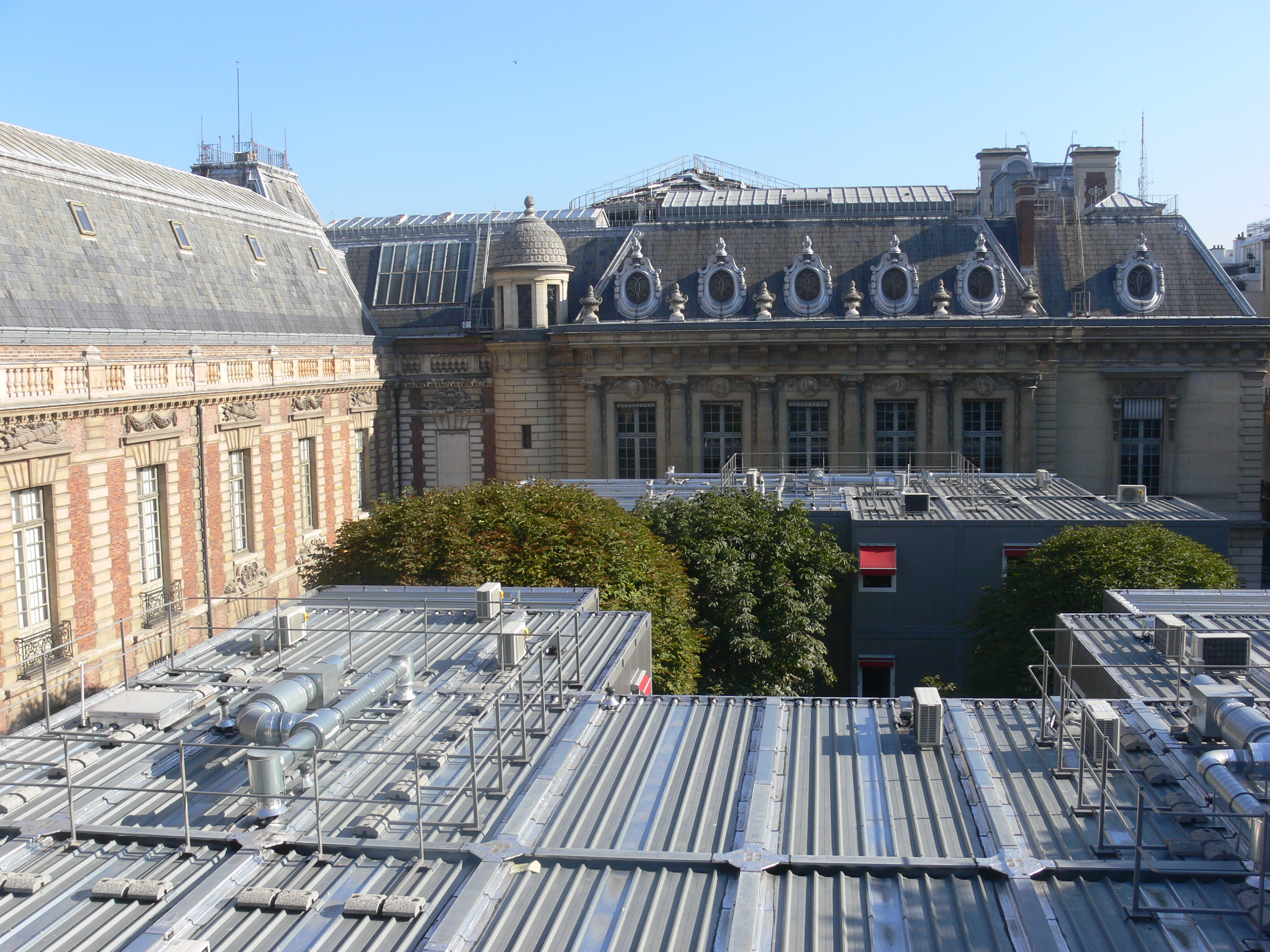 Bibliothèque nationale de France (Richelieu)